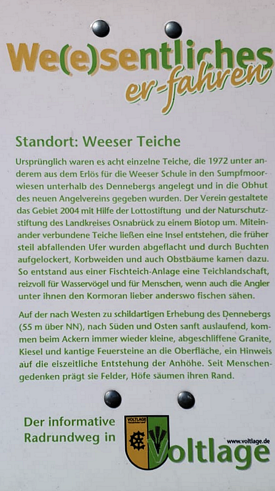 Infomationstafel an den Weese Teichen in Weese